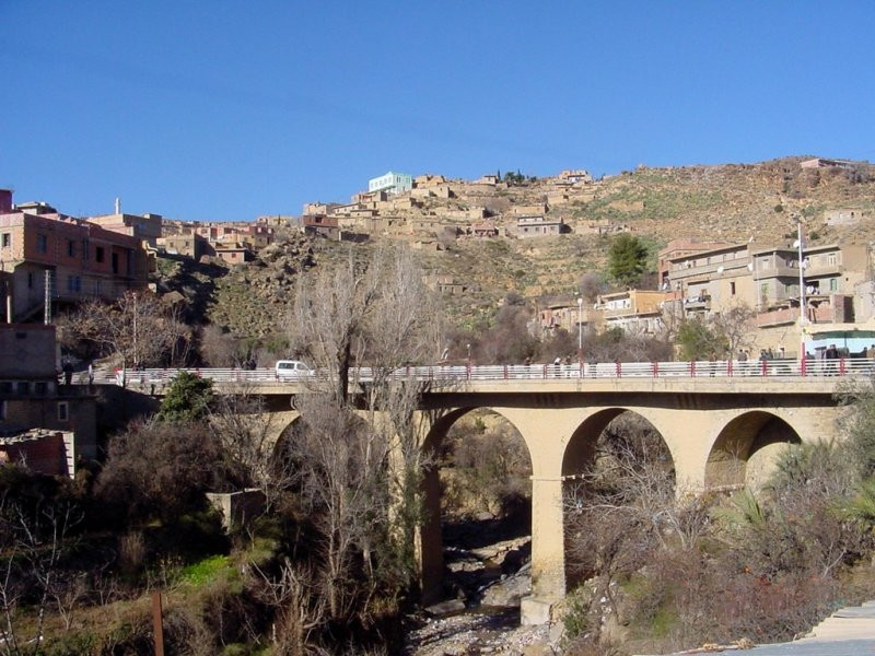 Vue sur le pont romain d'Arris